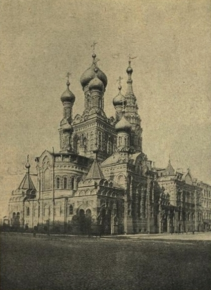 Церковь во имя Святой Троицы Общества религиозно-нравственного просвещения.